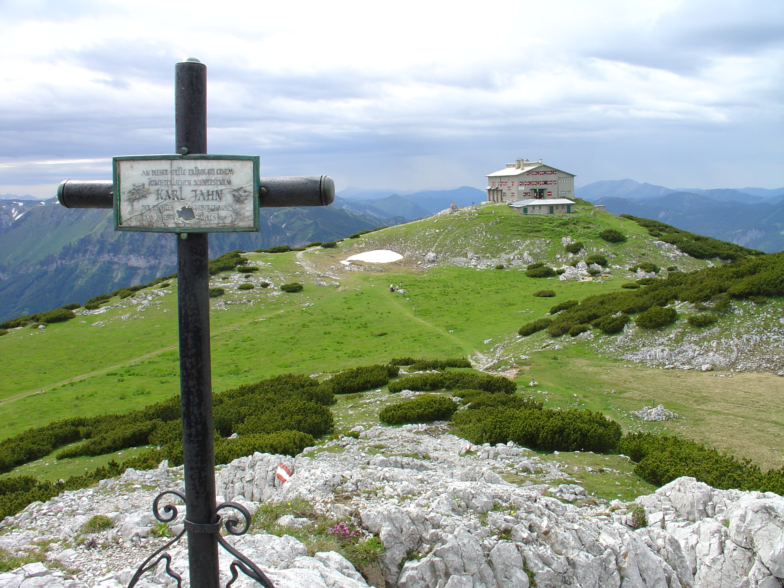 Habsburghaus, Rax, Niederösterreich.Marterl: An dieser Stelle erfror bei einem fürchterlichen Schneesturm Karl Jahn, der Pächter des Habsburghauses am 8. Februar des Jahres 1919. Habsburghaus im Hintergrund.